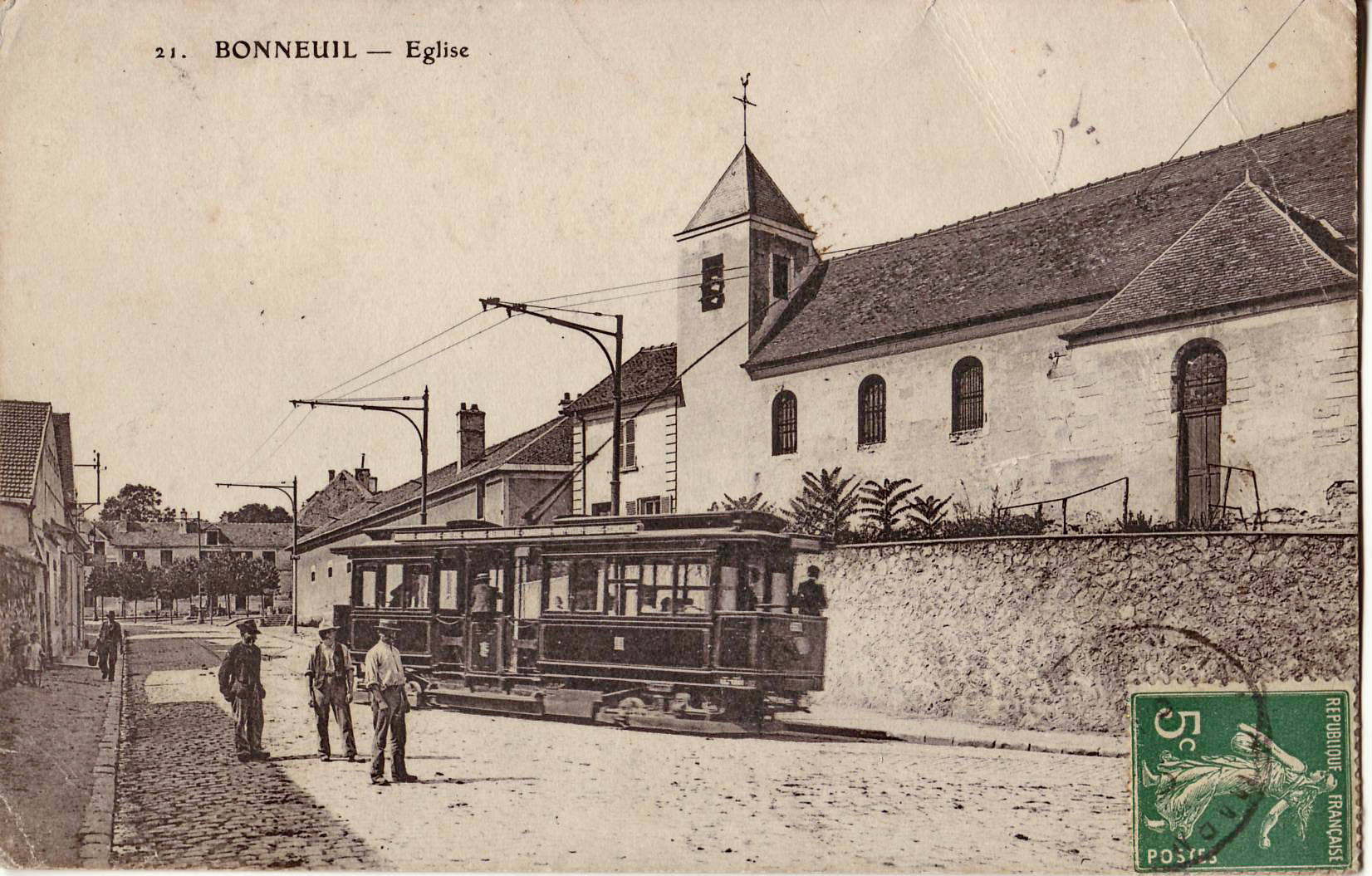 Carte postale ancienne, sans mention d'éditeur, n°21 : BONNEUIL - Église